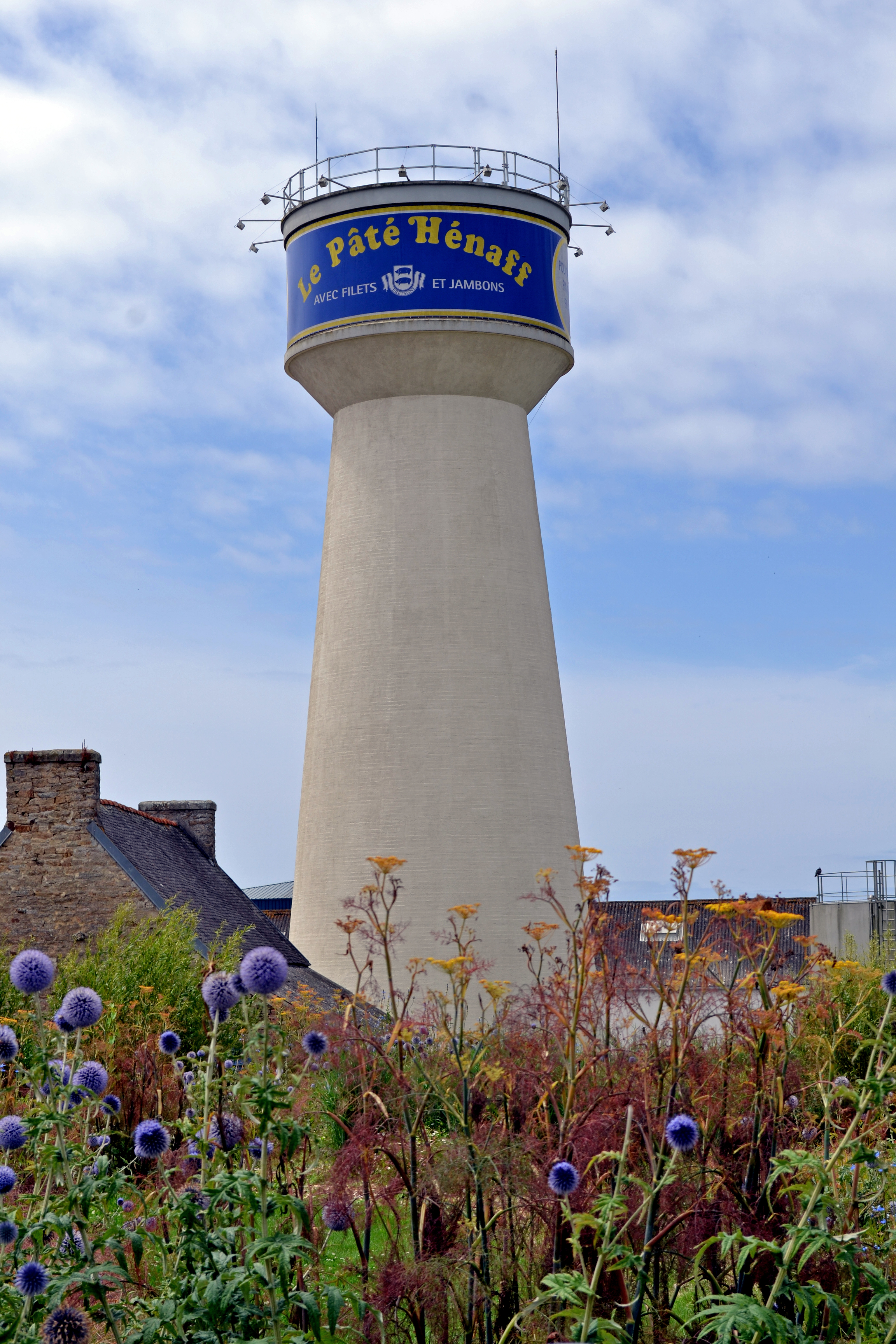 Château d'eau de l'usine Hénaff à Pouldreuzic, dont le réservoir est habillé à l'image d'une boîte de Pâté Hénaff.